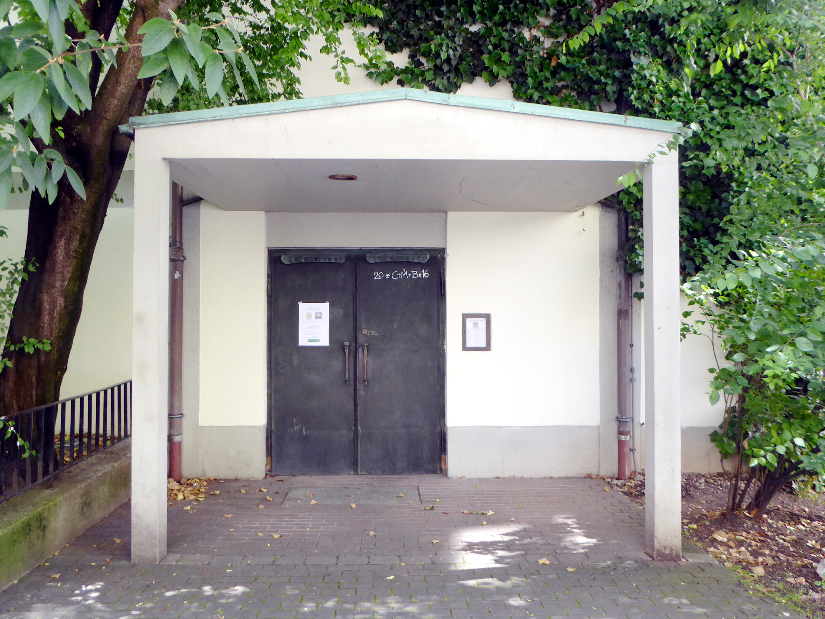 Eingang zur Herz-Jesu-Kloster-Kirche in der Isarvorstadt in München.